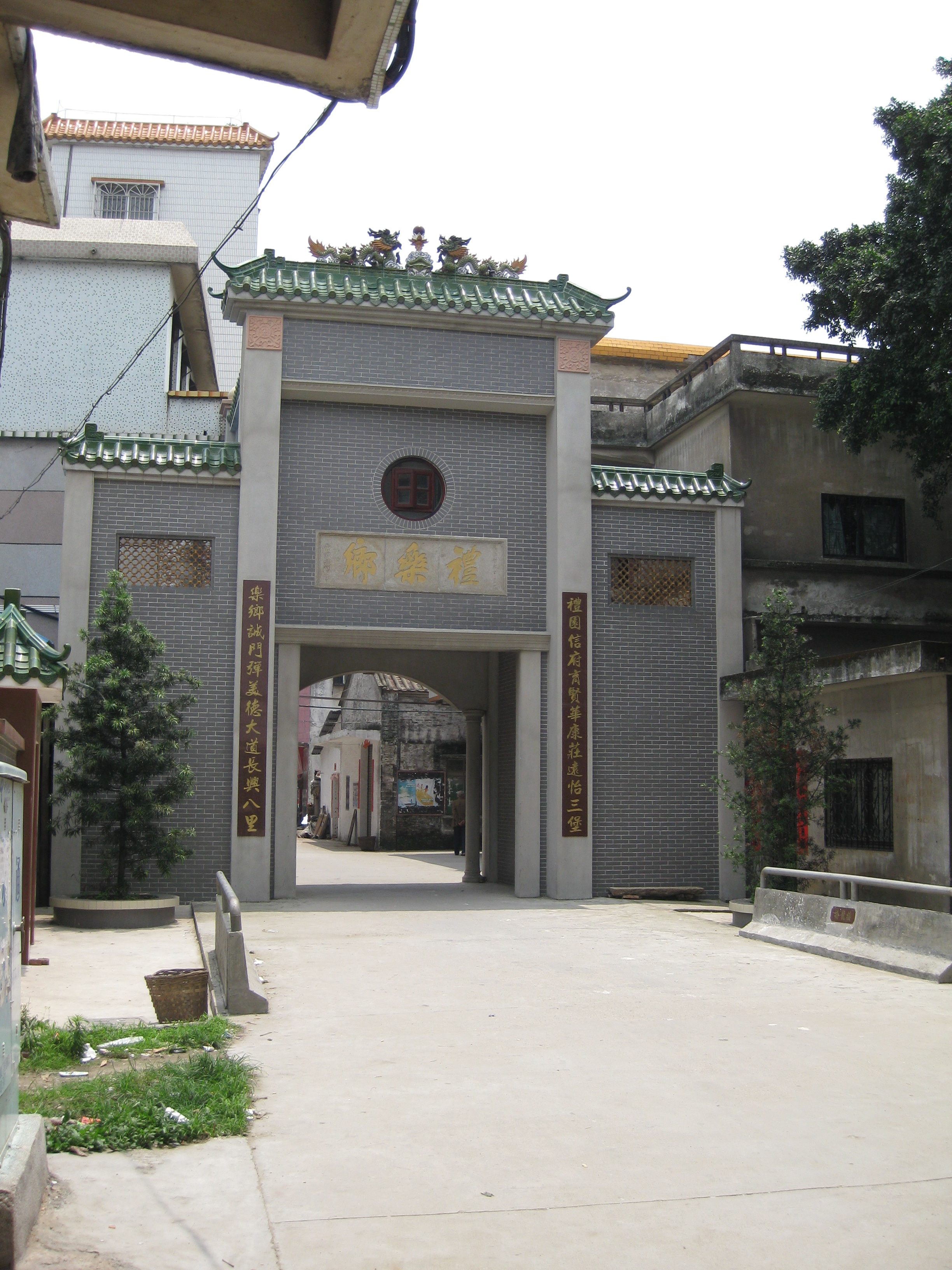 礼乐乡门楼